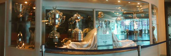 Imagen de los trofeos de Vélez Sarsfield en el museo del club.